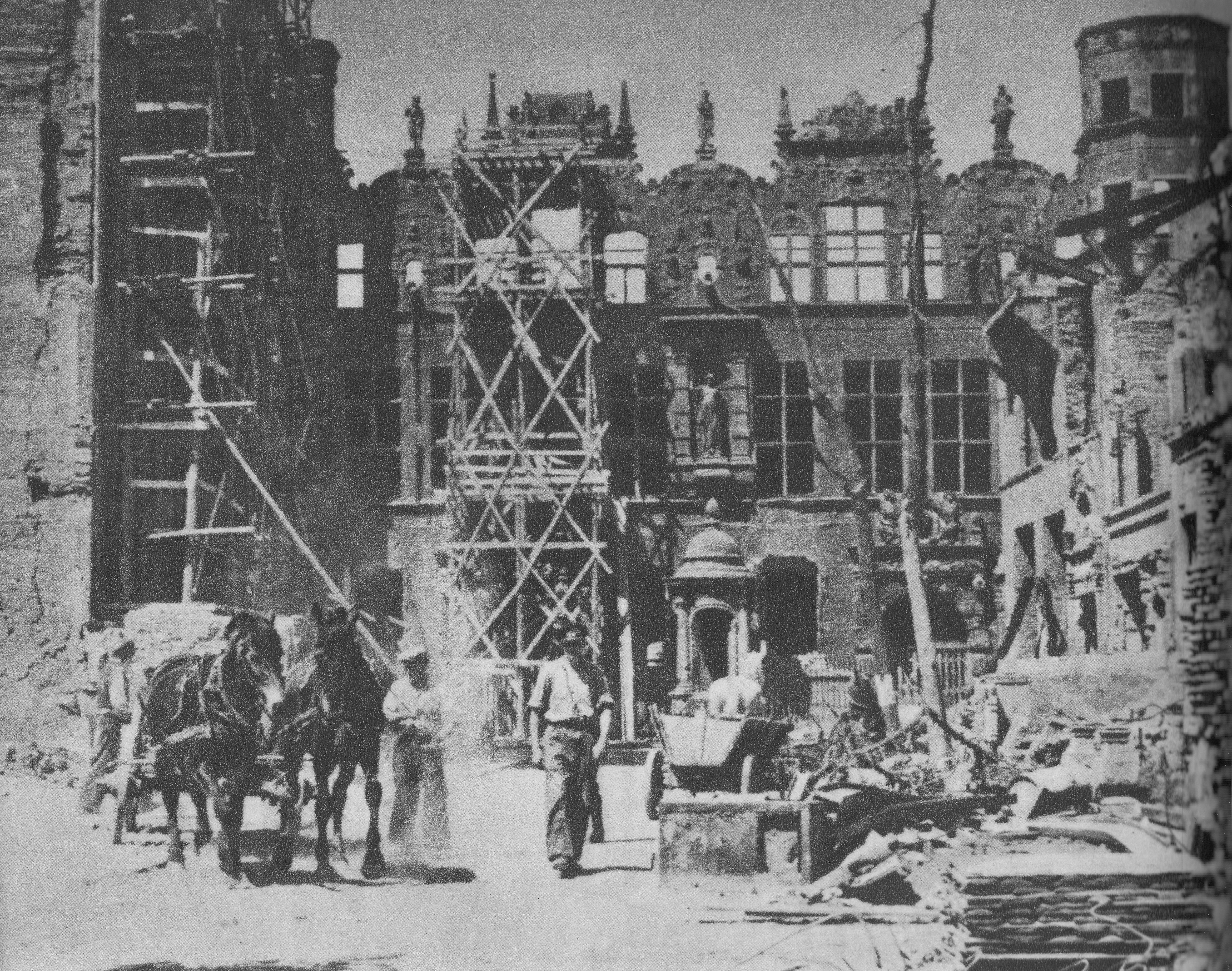 Odbudowa Wielkiej Zbrojowni w Gdańsku.